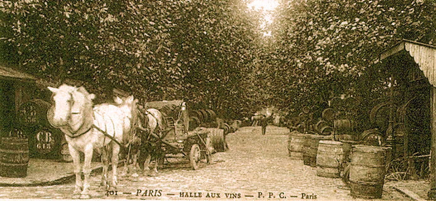 La Halles aux vins de Paris au début du XXe siècle